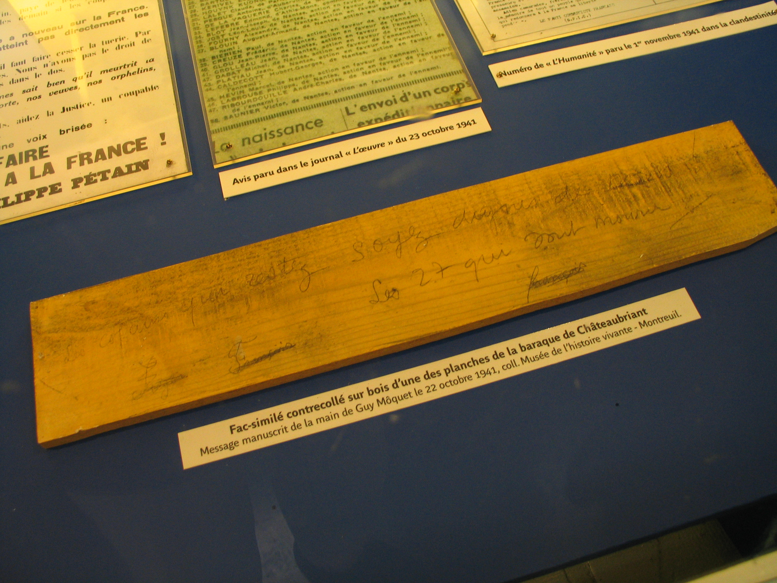 Exposition métro Guy Môquet, Paris. Message écrit par Guy Môquet le jour de son exécution : « Les copains qui restez, soyez dignes de nous ! Les 27 qui vont mourir. »